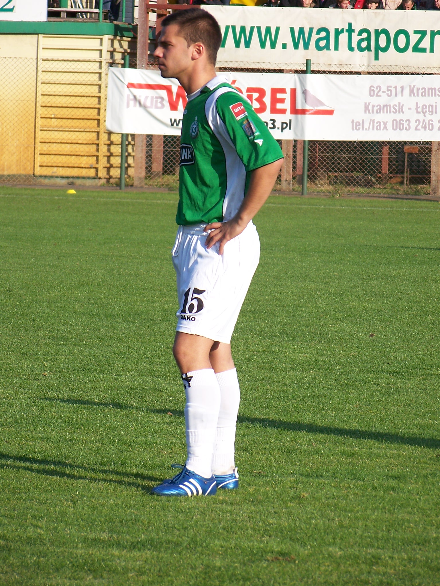 Filip Burkhardt podczas meczu I ligi z Zagłębiem Lubin.